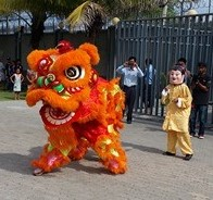 Chinesisches Neujahr in Dili, Osttimor